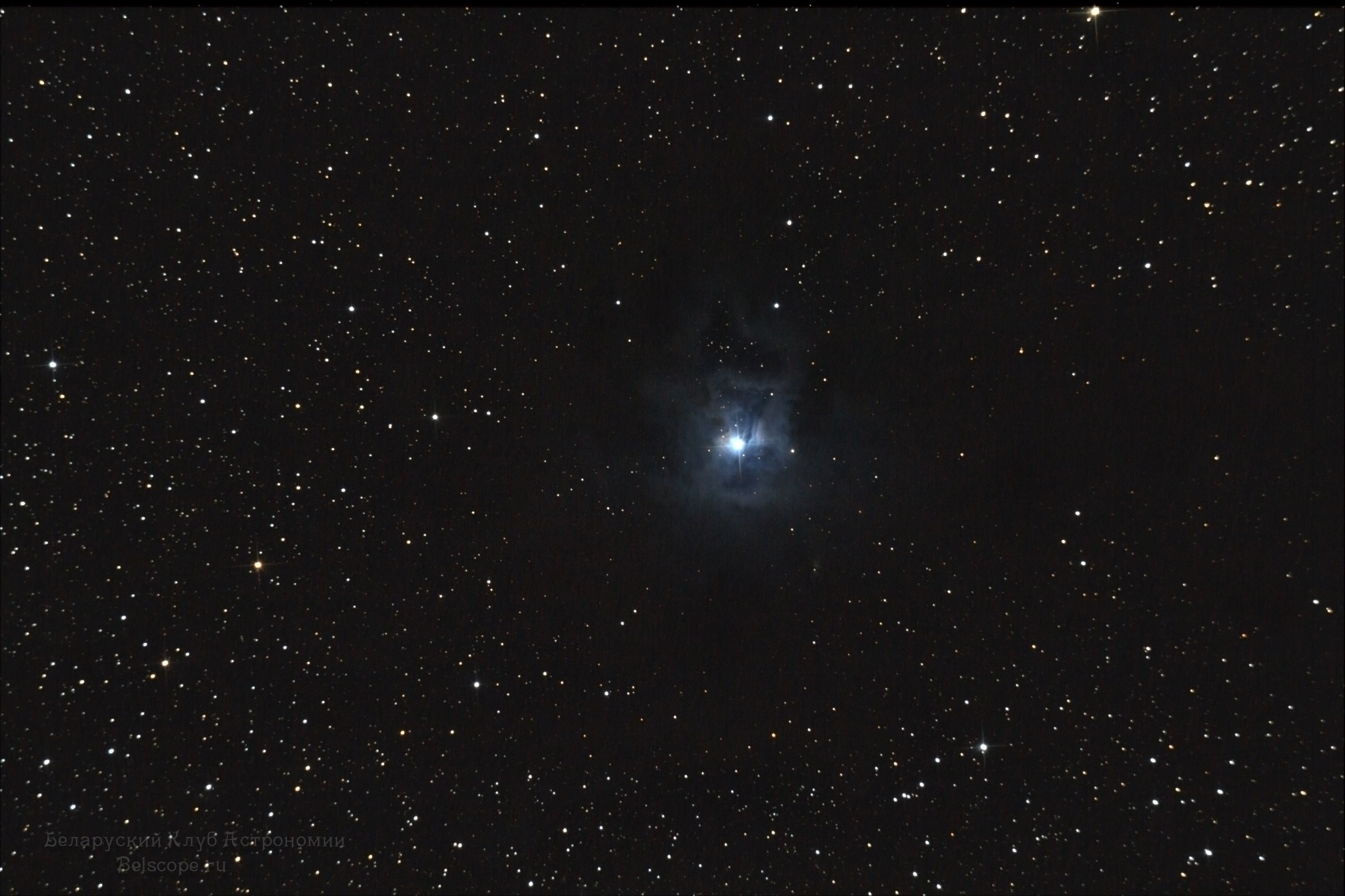 NGC 7023 или Туманность Ирис снята на через телескоп SW N200, фотоаппарат Canon 550D , (ISO 3200, суммарная выдержка 33 минуты), сложение и обработка: DSS, FITStacker V1.2. БКА - (Белорусский клуб астрономии)